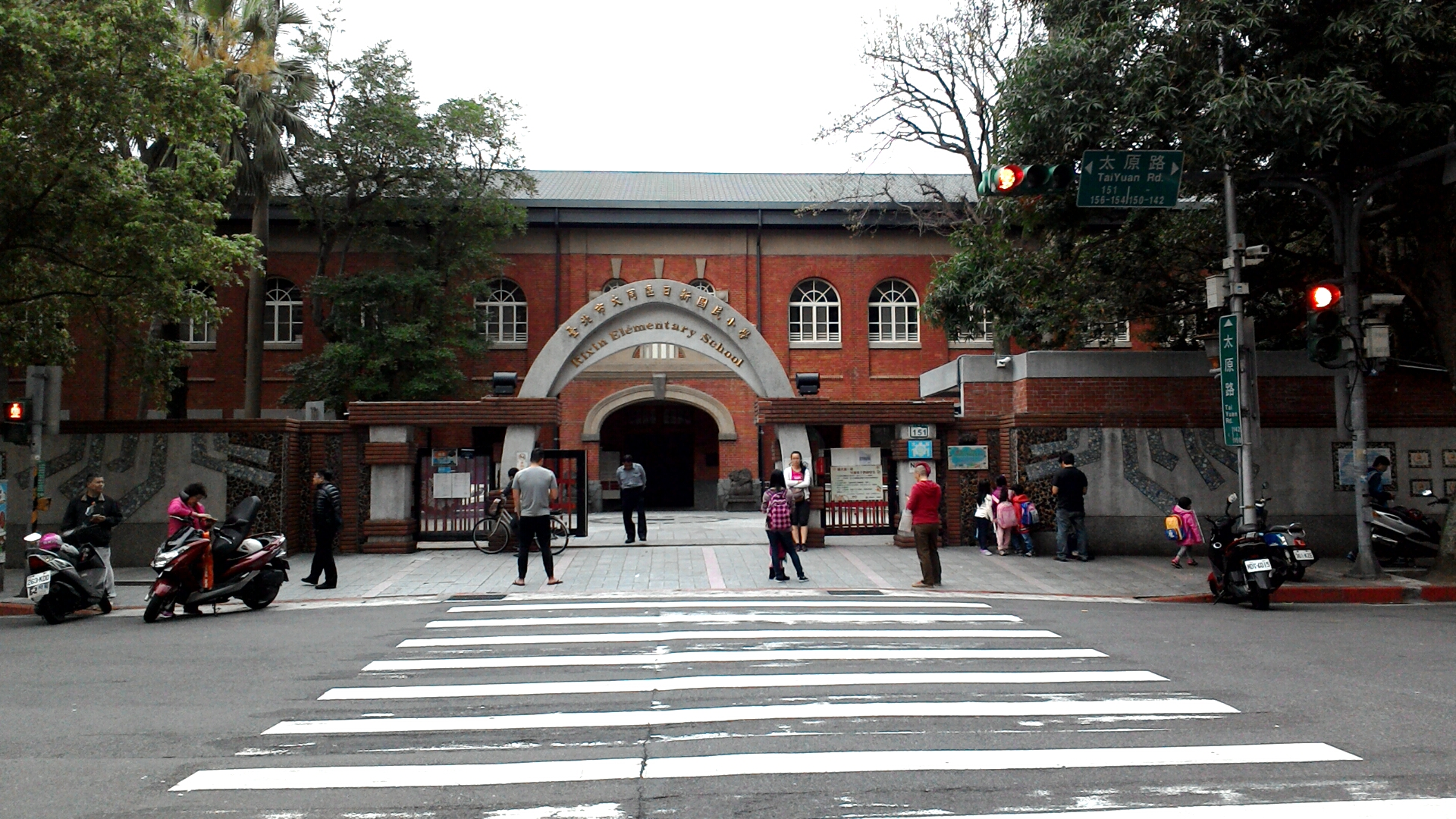 放學時間的臺北市大同區日新國民小學(前門)